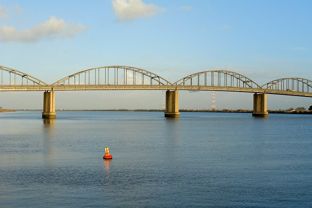 Bridge in Vila Franca de Xira, Portugal; Ponte Marechal Carmona.